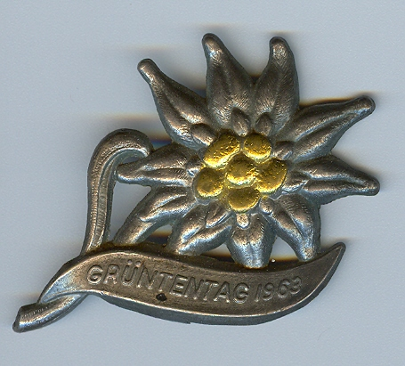 Abzeichen von der jährlichen Bergmesse auf dem Grünten (1963) Grünten beim Ehrenmal der Gebirgsjäger